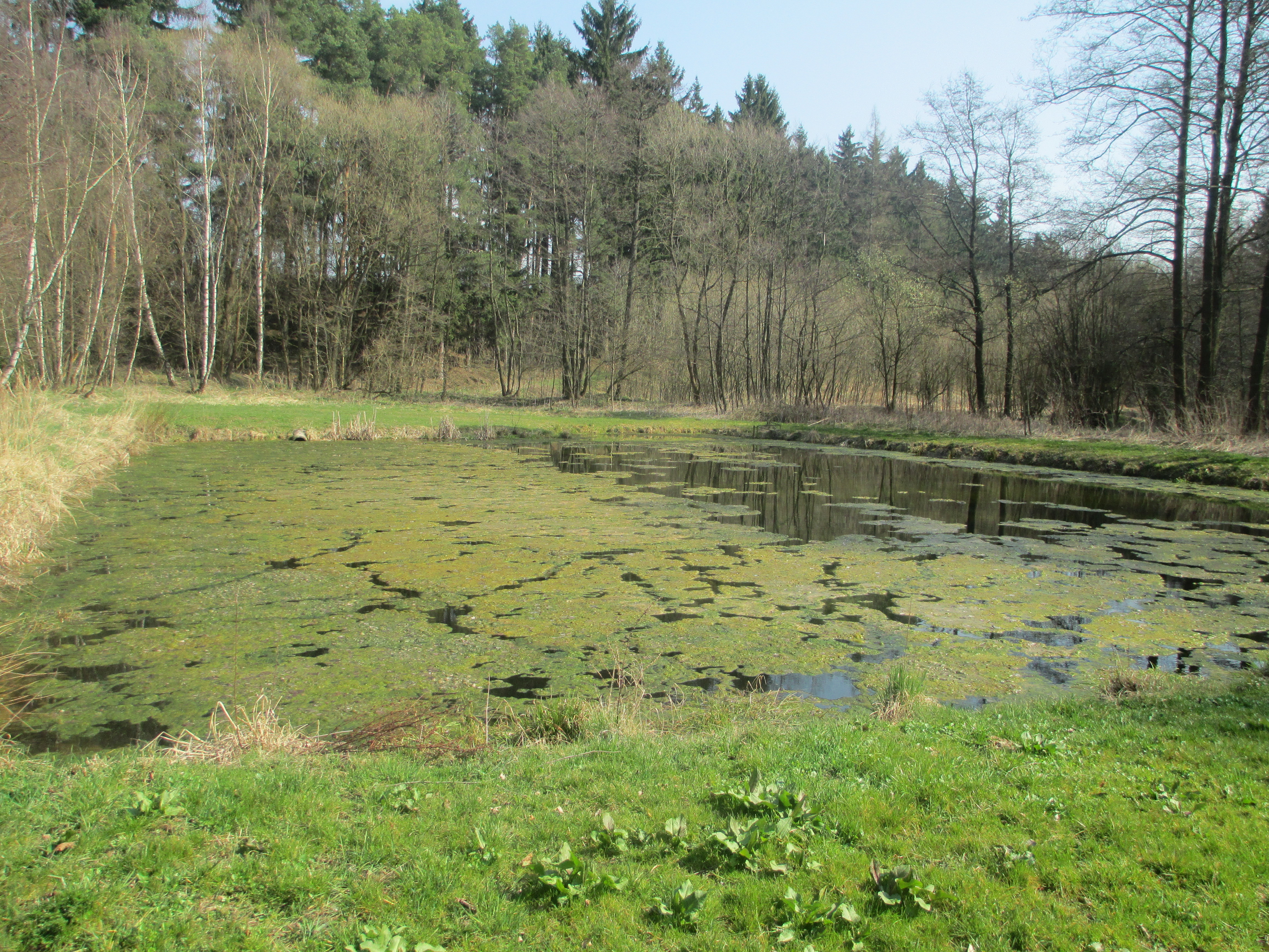 Nádrž v chráněném území Koupaliště u Bohuslavice